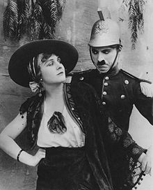 Fotografía de la película A Burlesque on Carmen, de 1915.